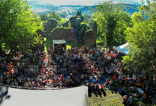 Hohentwiel-Festival 2007: Im Vordergrund die Bühne, dahinter die Besucher vor der Kaserne der Unteren Festung